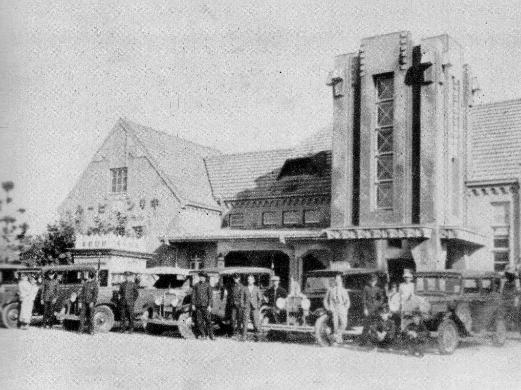 昭和5年頃の安城自動車のバス 西尾駅前